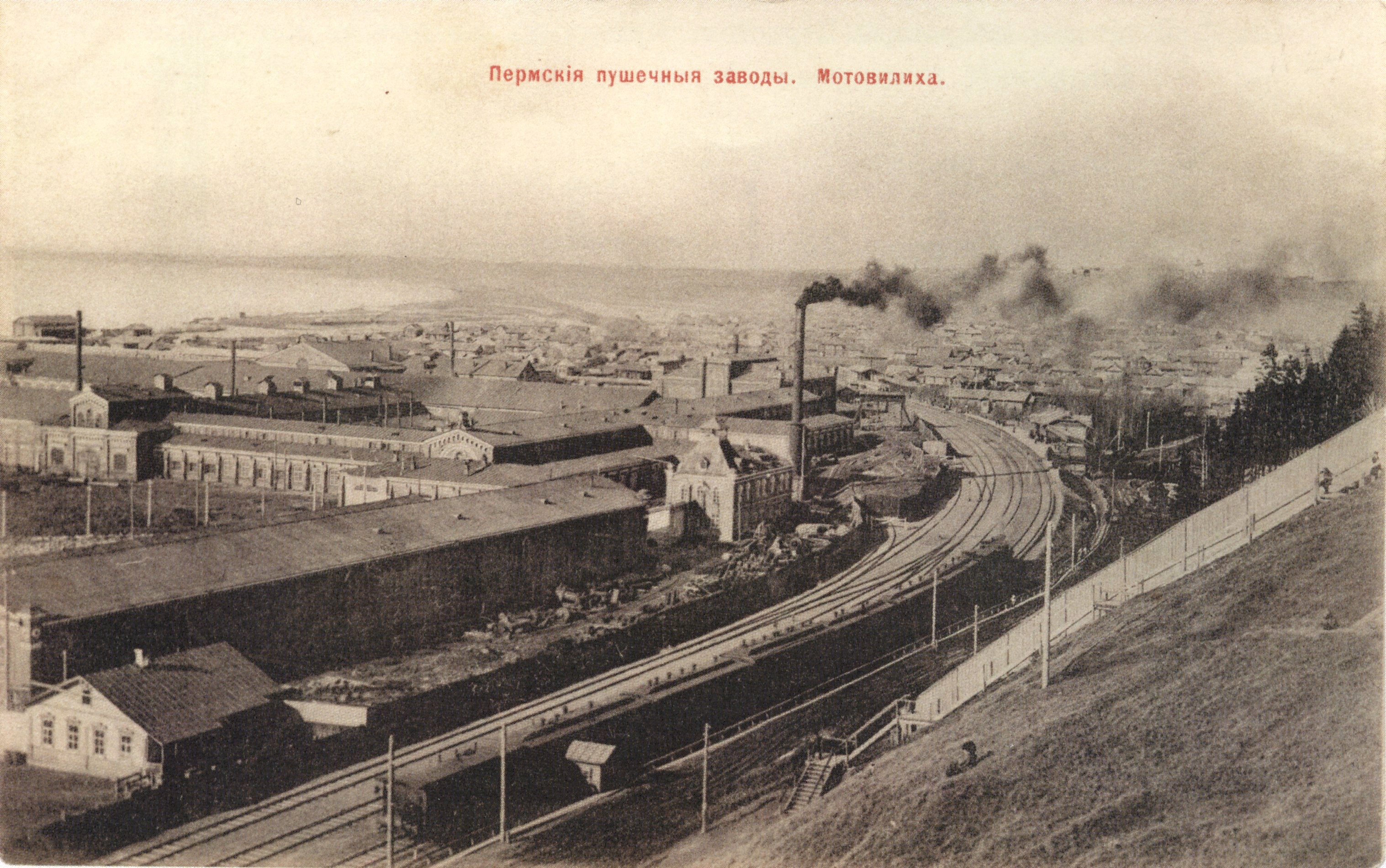 Пермские пушечные заводы в Мотовилихе.